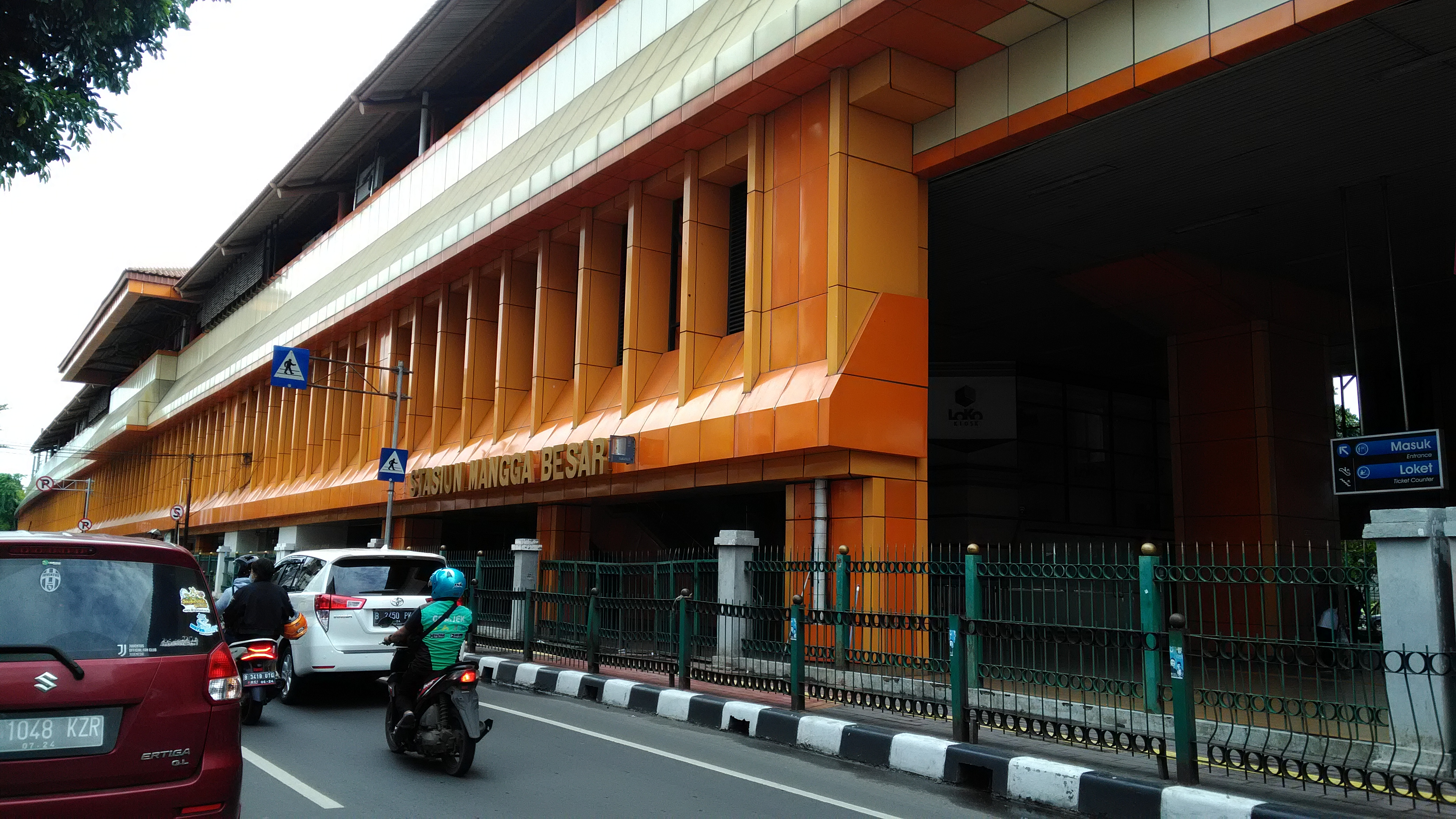 Sunda: Stasion Mangga Besar, 2020